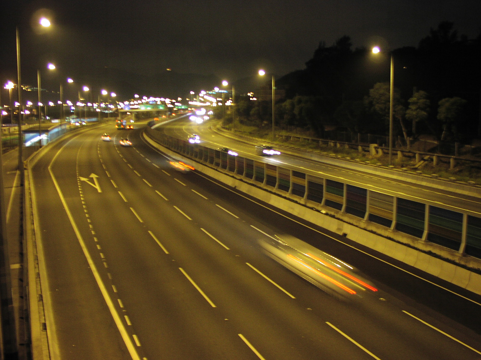 吐露港公路